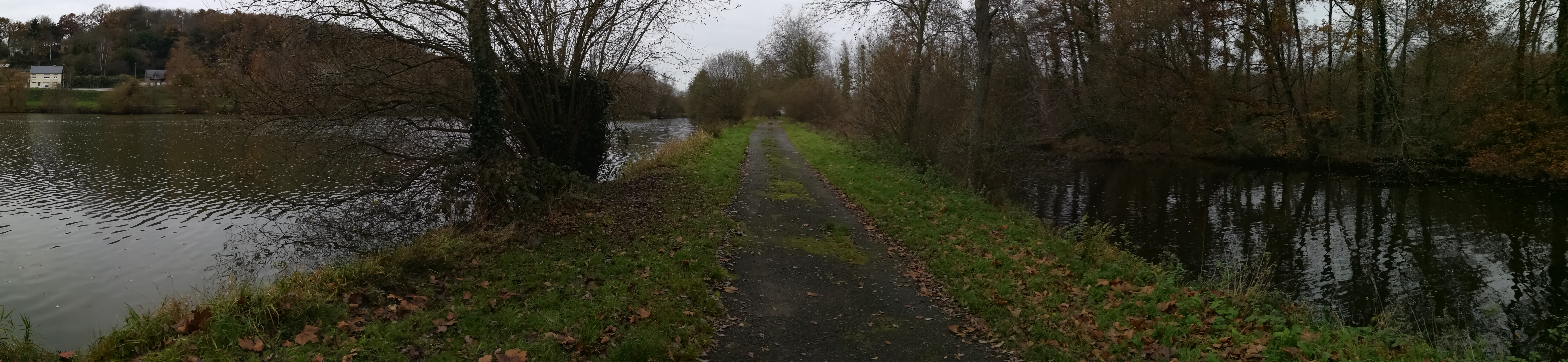 Etang (à gauche) et Rivière Lié (à droite) à La Chèze.